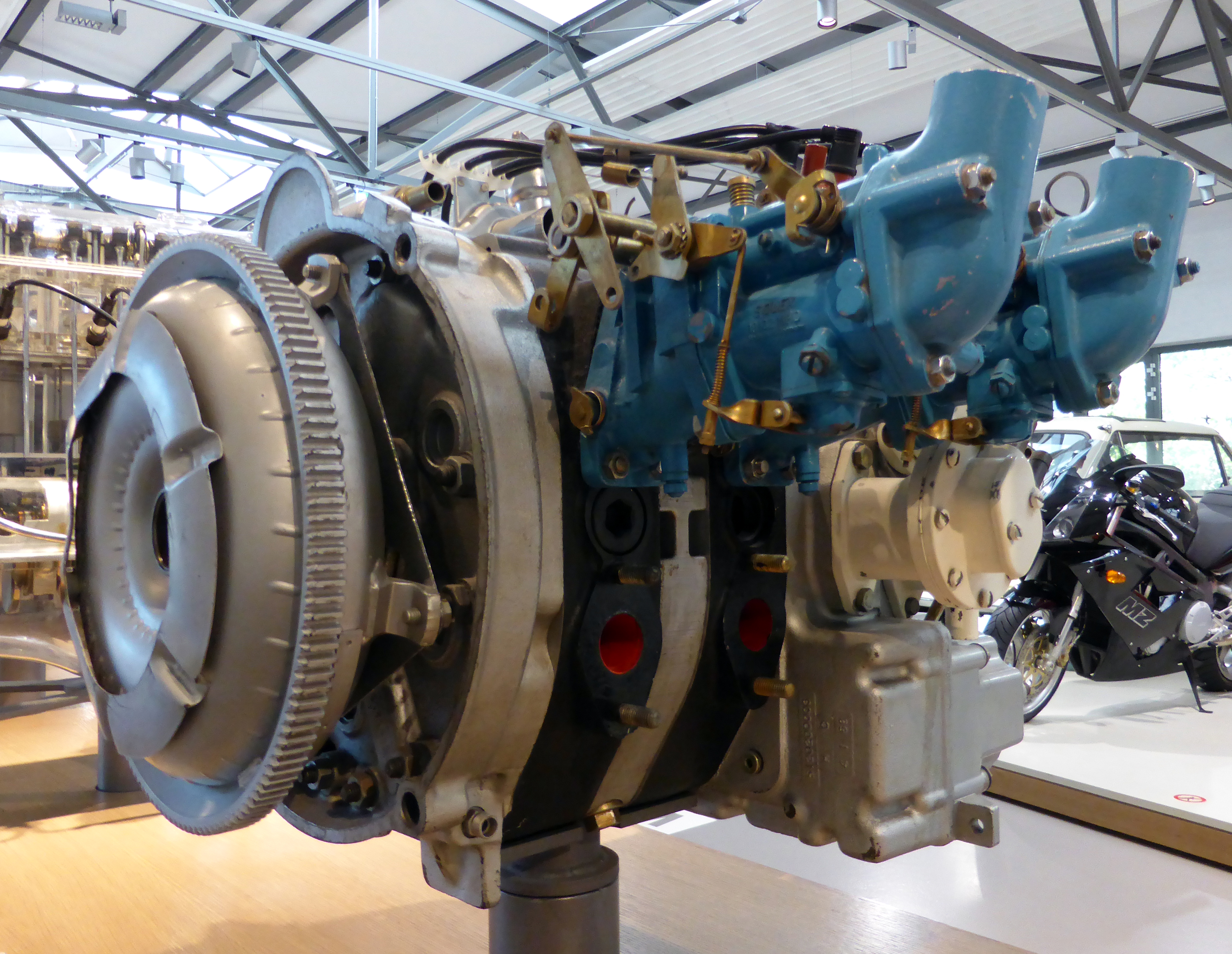 Wankelmotor eines NSU Ro 80, Baujahr 1970 (Rotationskolbenmotor). Ausgestellt im Deutschen Technikmuseum Berlin. Wikipedianische KulTour am 10. Oktober 2015 in der Ausstellung des Museums.